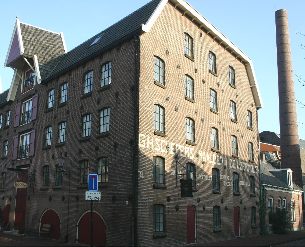 Zelf gemaakte foto. Bij het noemen van bron (Wikipedia) en auteur (T. Nijeholt) mag dit vrij overgenomen worden